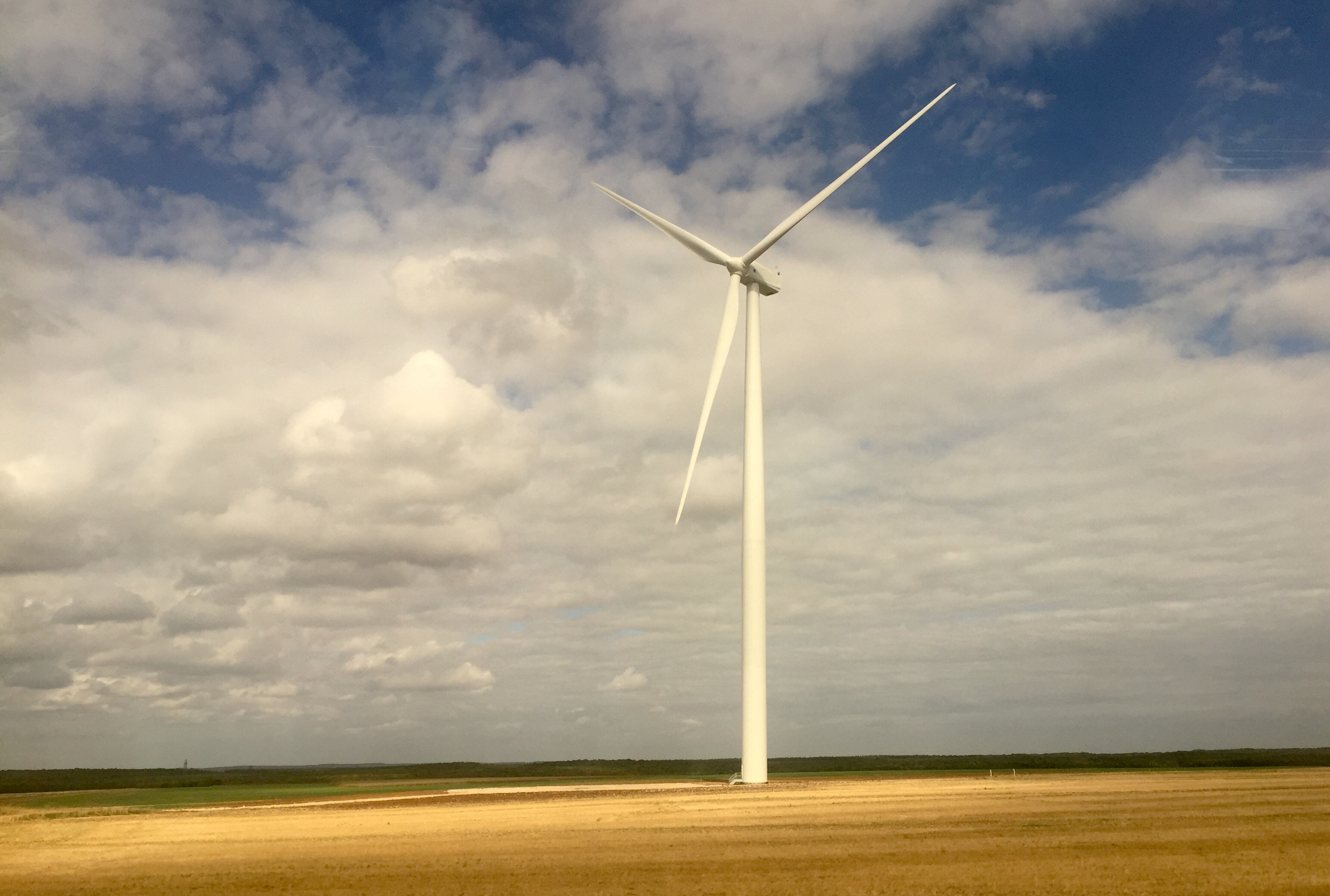 éolienne.depuis le TGV Paris-Lyon.